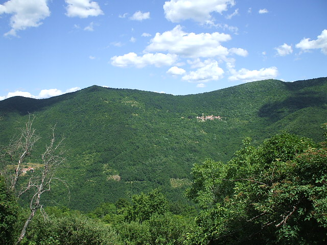 Dova Inferiore 2